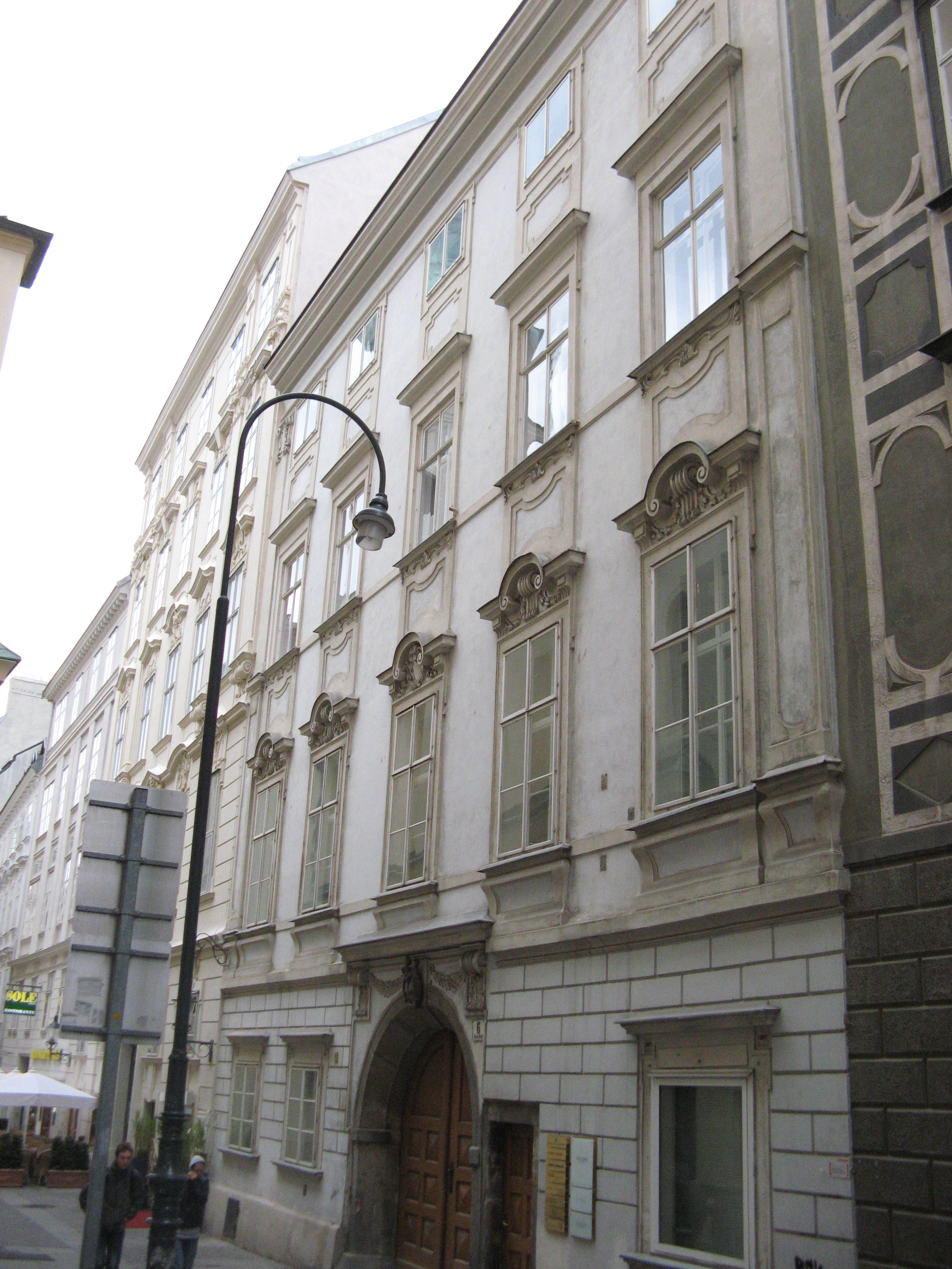 Herzogenburgerhof (um 1700), Annagasse 6, Wien-Innere Stadt